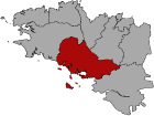 carte du pays de Vannes